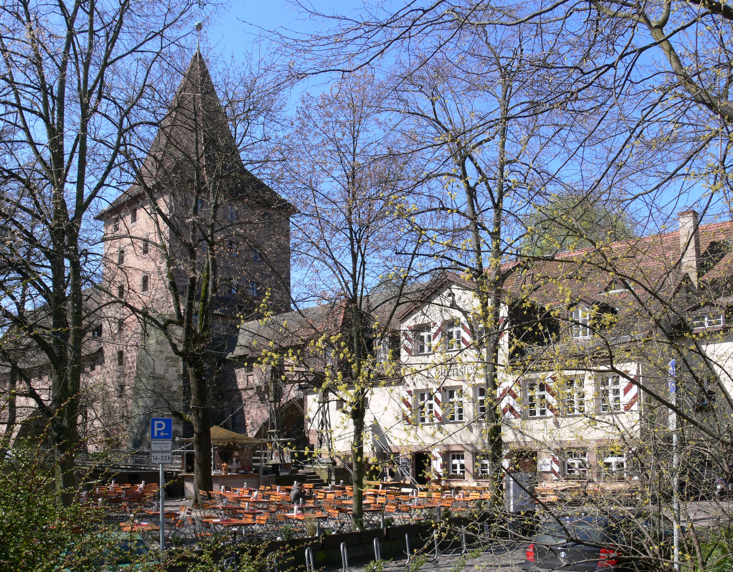 Nürnberg, Schlayerturm (Turm „Grünes F“, Westtorzwinger 2), Kettensteg und Gaststätte „Kettensteg“